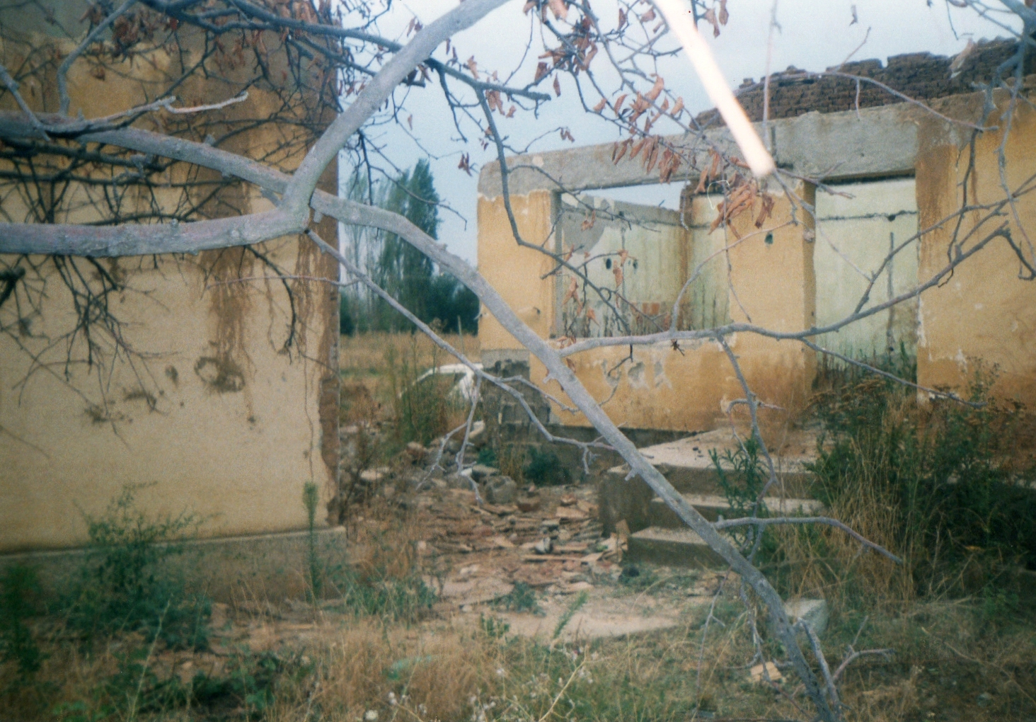 Уништена српска кућа у Душанову 1999. год.